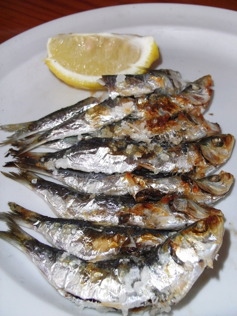 Espeto de sardinas ya emplatado, en Benalmádena, Málaga. Para más información ver artículo en el blog Ellaboratoriogastronomico